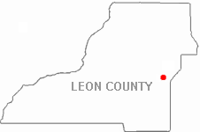 Map